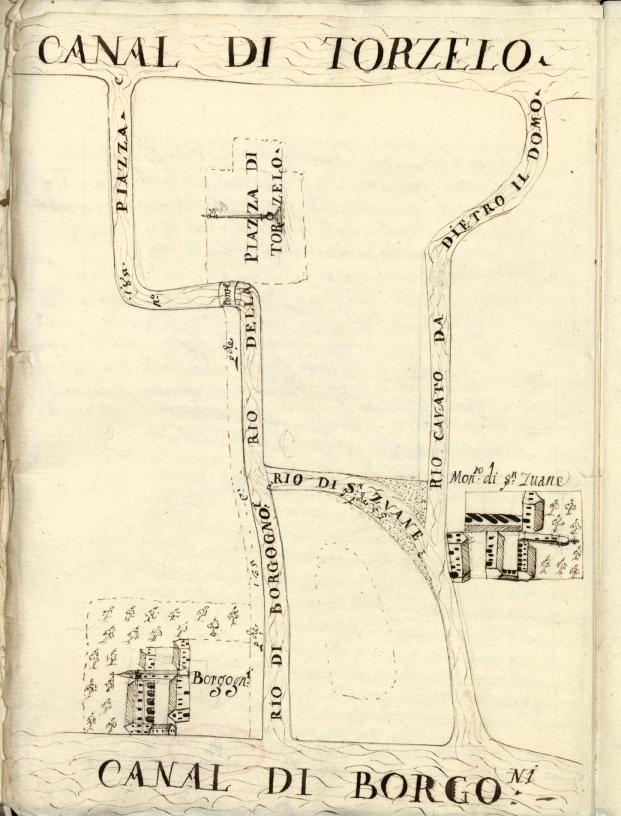 Rappresentazione dell'isola di Torcello del 12 marzo 1688 - Archivio di Stato di Venezia, fondo Savi ed Esecutori alle Acque.